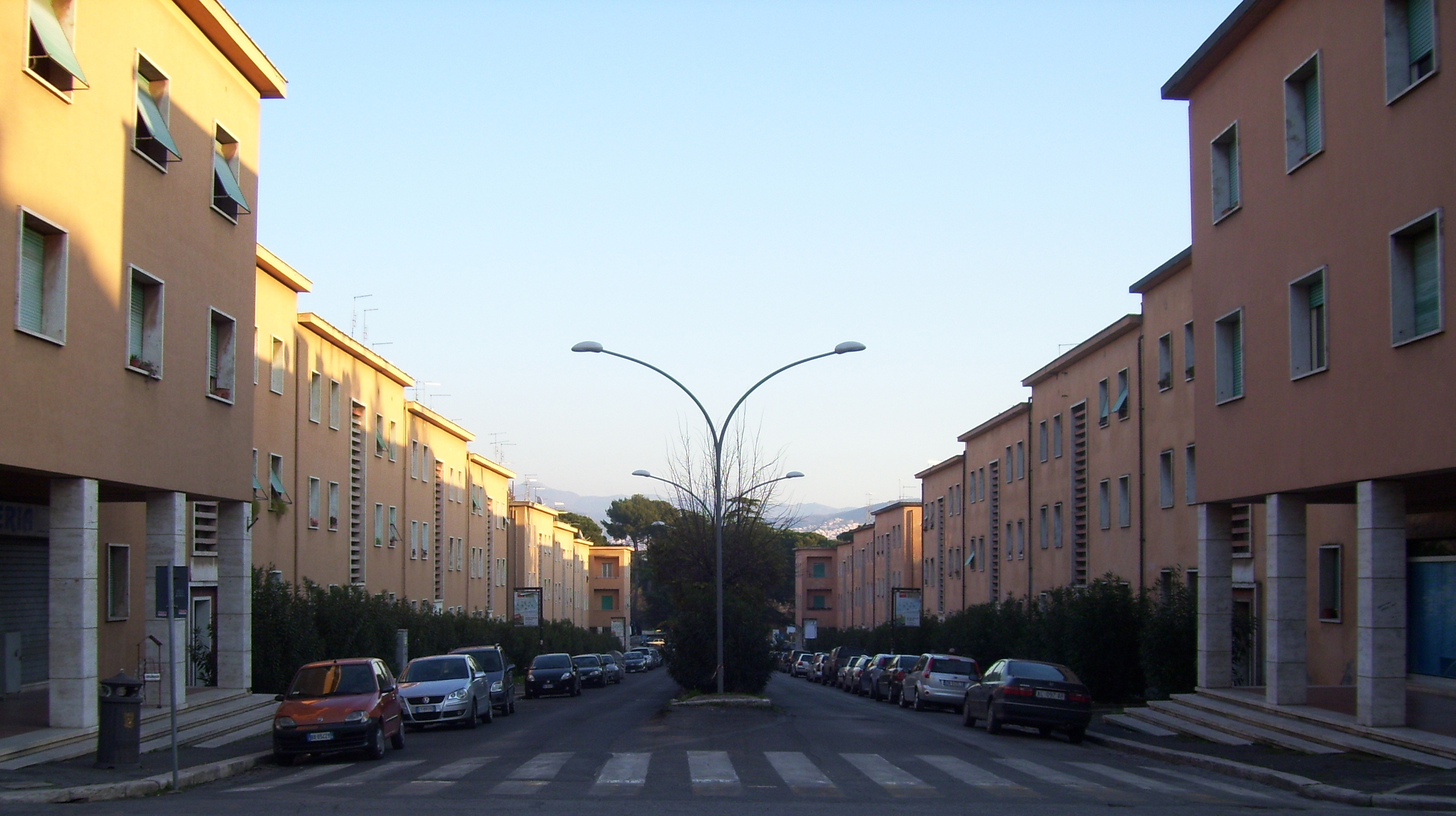 Via Leonardo da Vinci a Guidonia. Ai lati le case popolari costruite tra il 1935 e il 1937 con il progetto originale della città di fondazione.